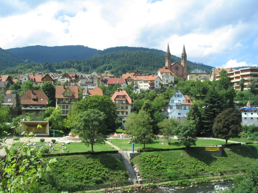 Forbach mit Sankt Johanniskirche. Blick vom Bahnhof aus.